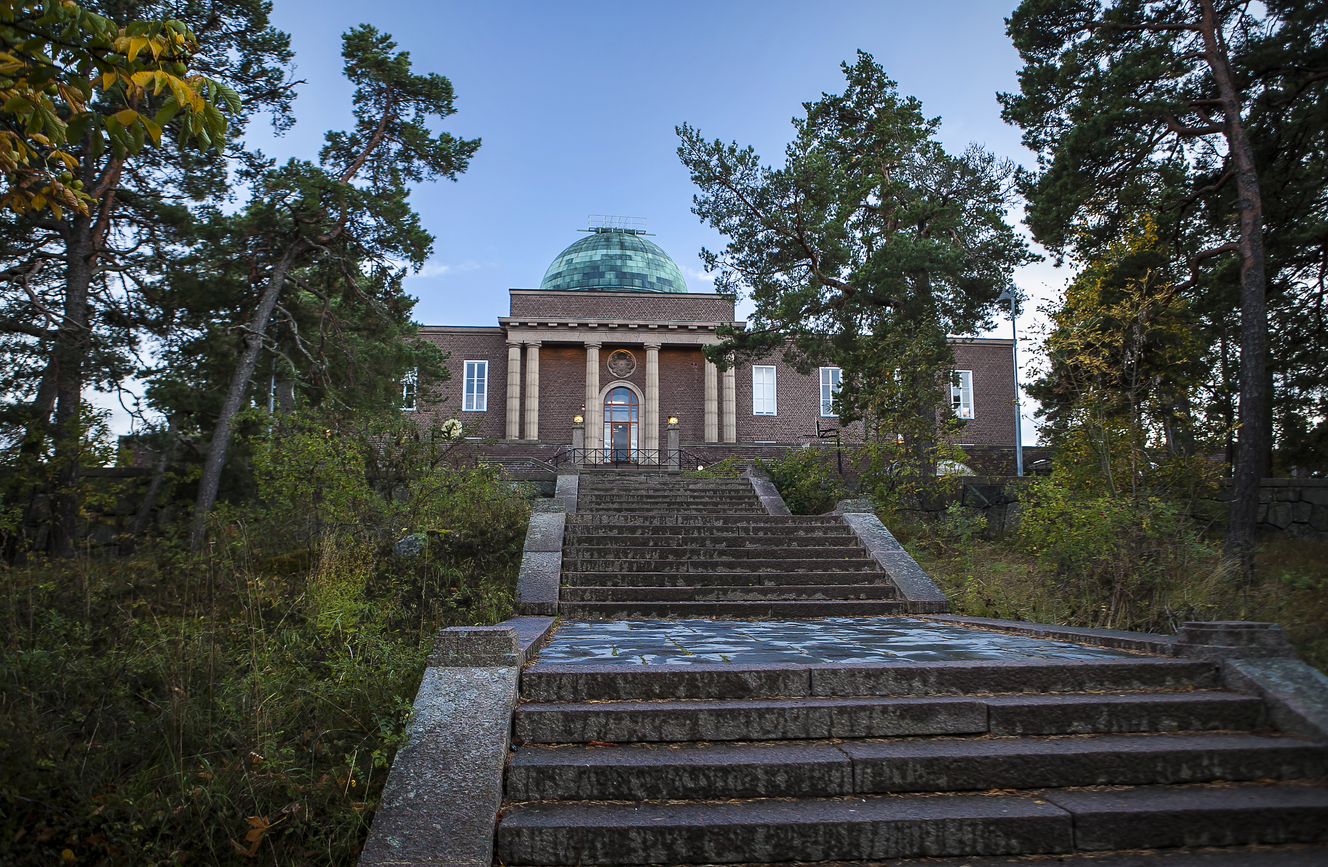 Stockholms observatorium